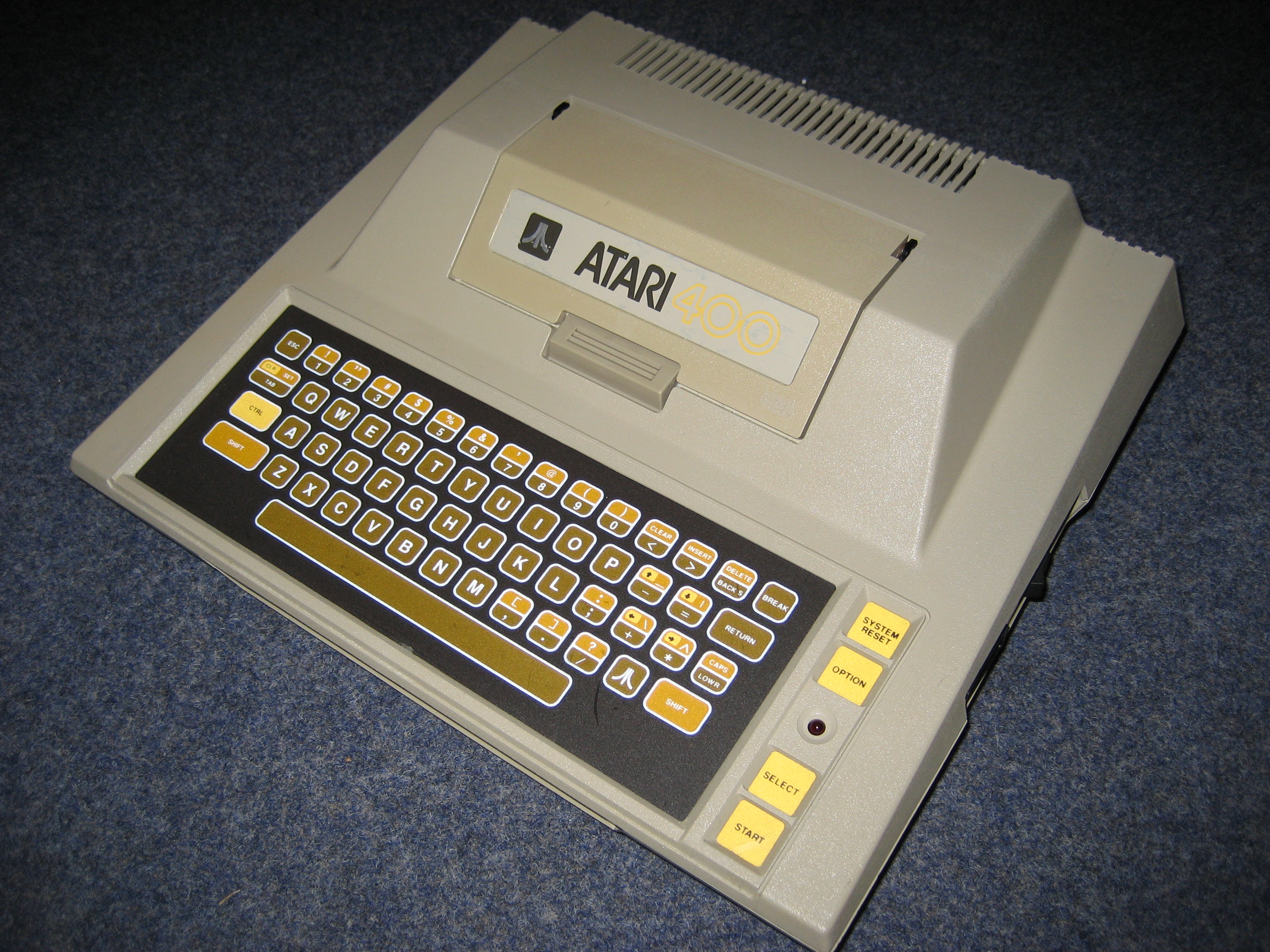 Atari 400 Home Computer